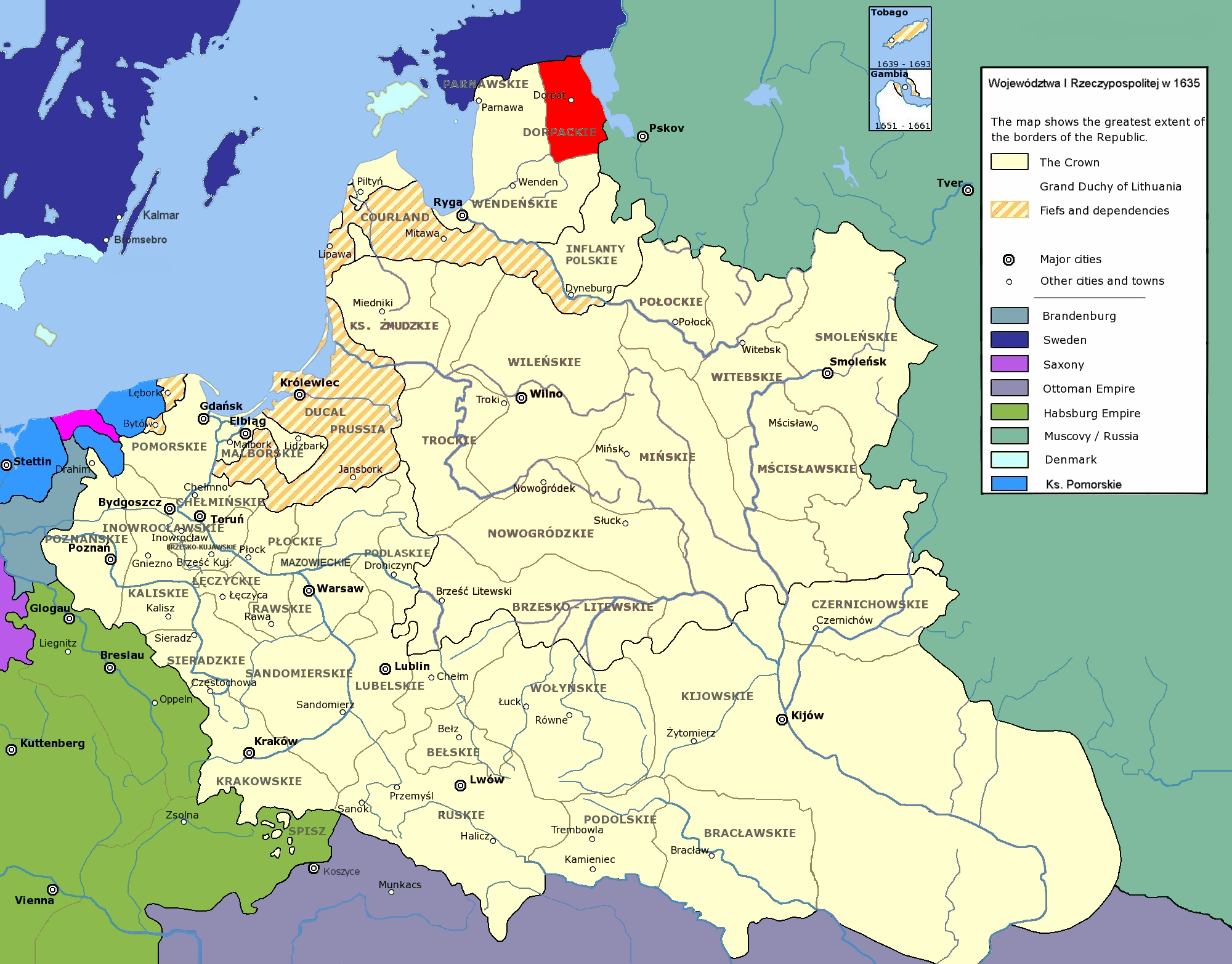 Rzeczpospolita Obojga Narodów w 1635 r.; województwo dorpackie Polish-Lithuanian Commonwealth in 1635; Dorpat Voivodeship